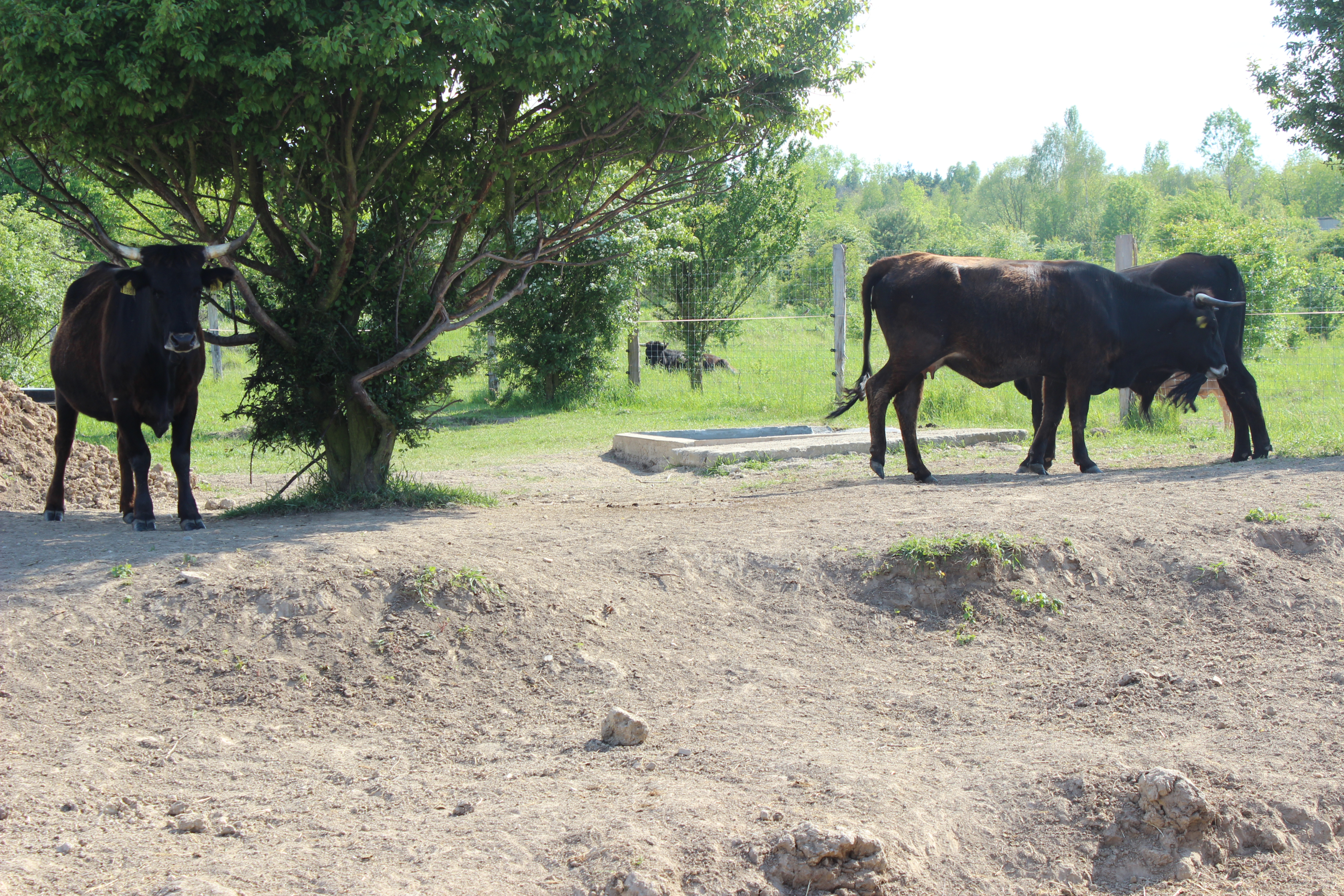 Pratuři v přírodní rezervaci Milovice.